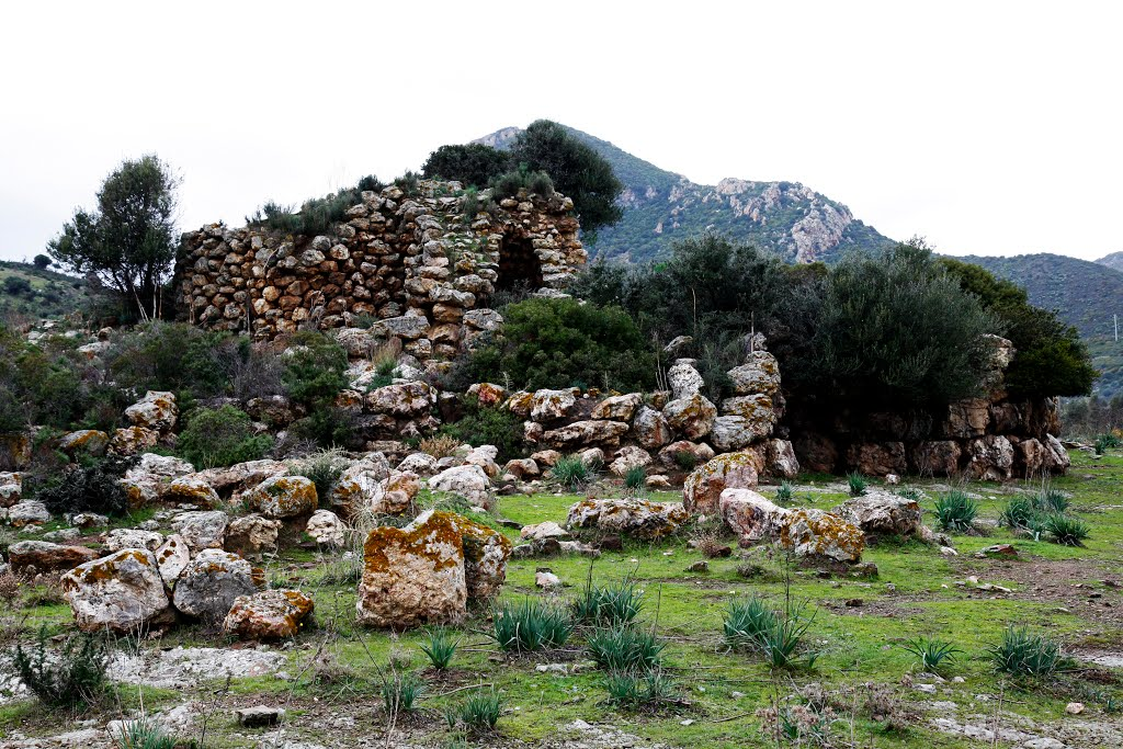 Nuraghe Sa Domu 'e s'Orcu (Domusnovas) Sardaigne